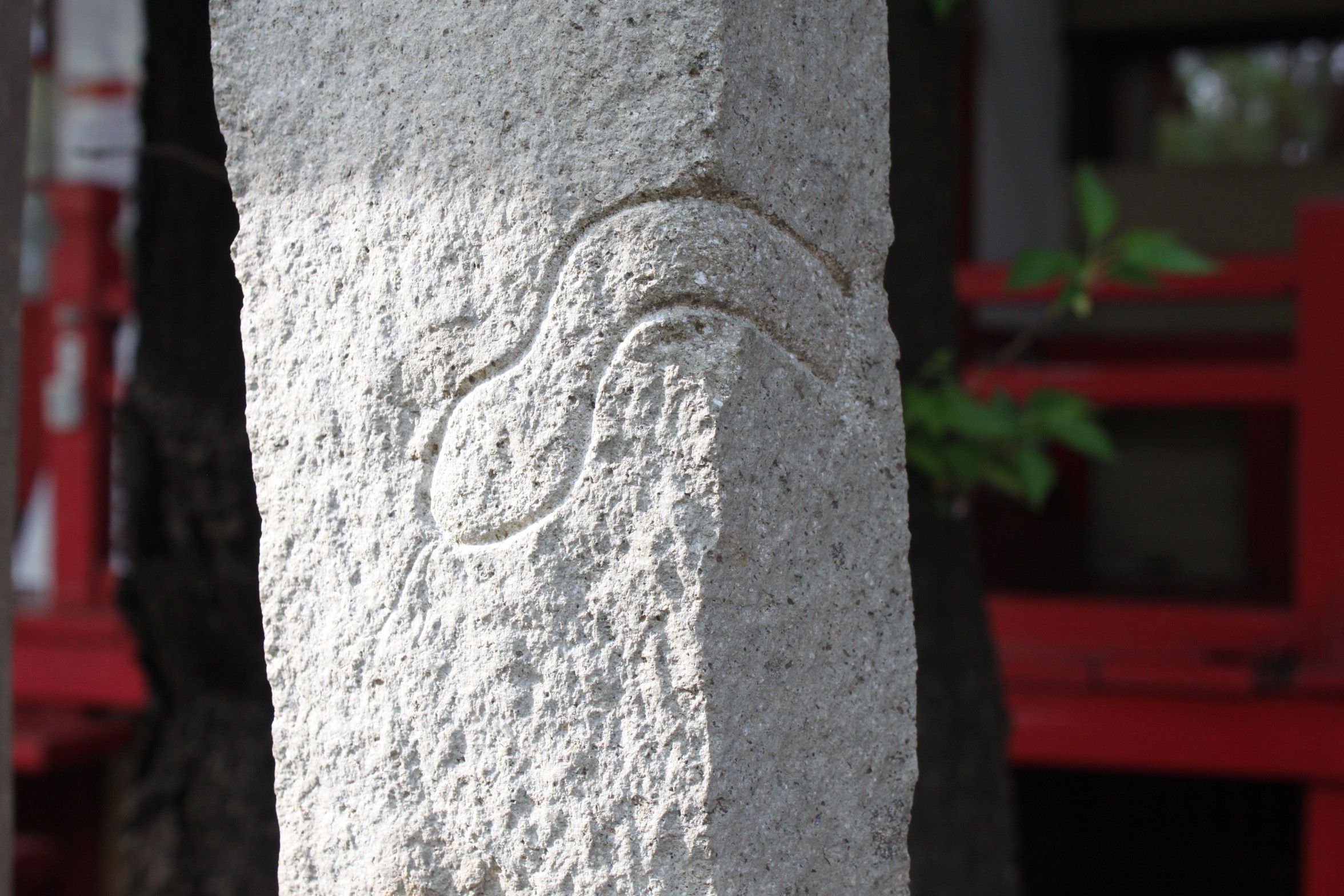 宝珠院なめくじ